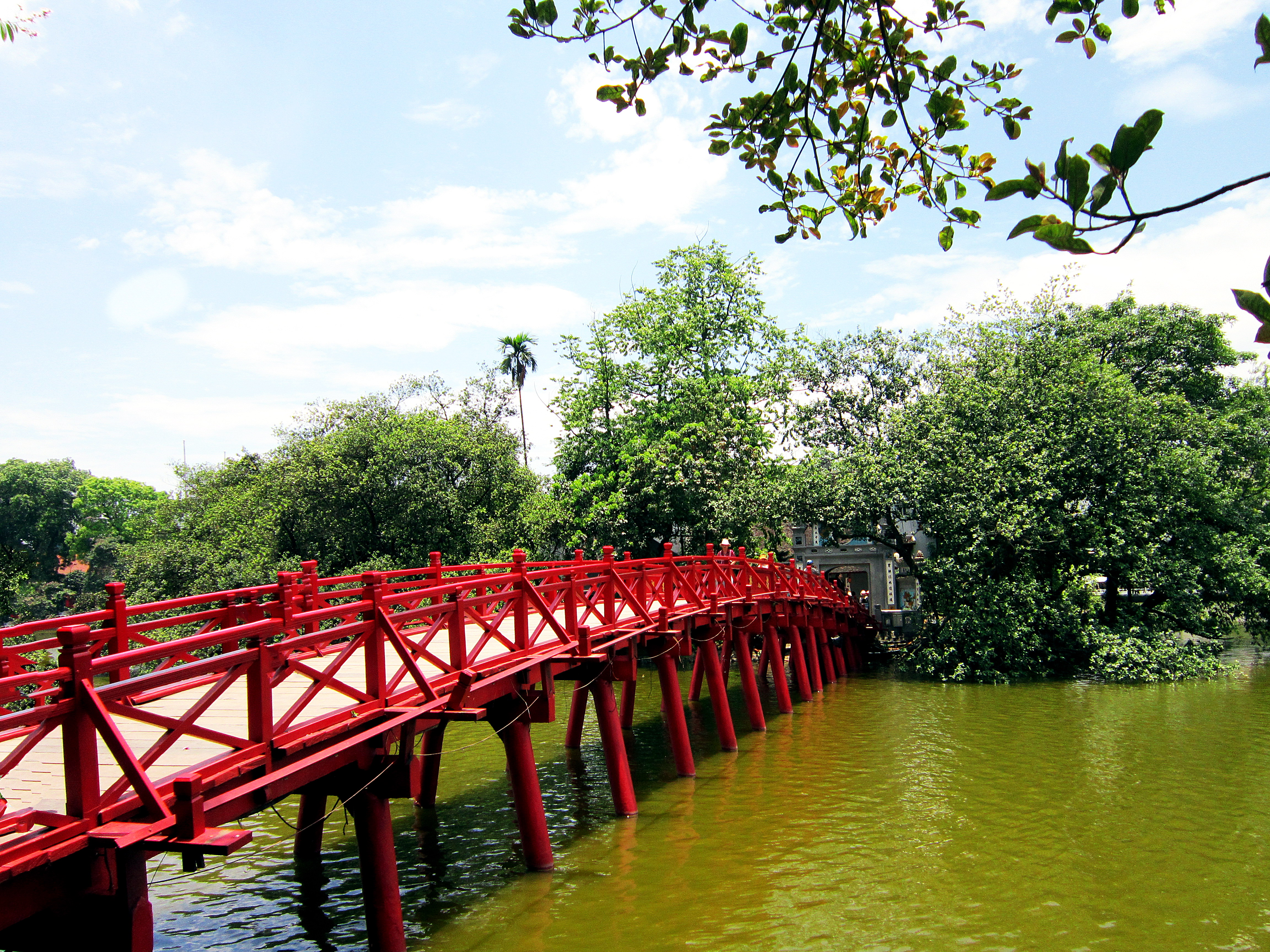 Cầu Thê Húc dẫn đến cổng đền Ngọc Sơn (Hà Nội, Việt Nam), được xây dựng vào năm 1865.